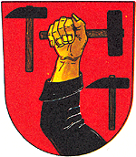 znak obce Rejštejn